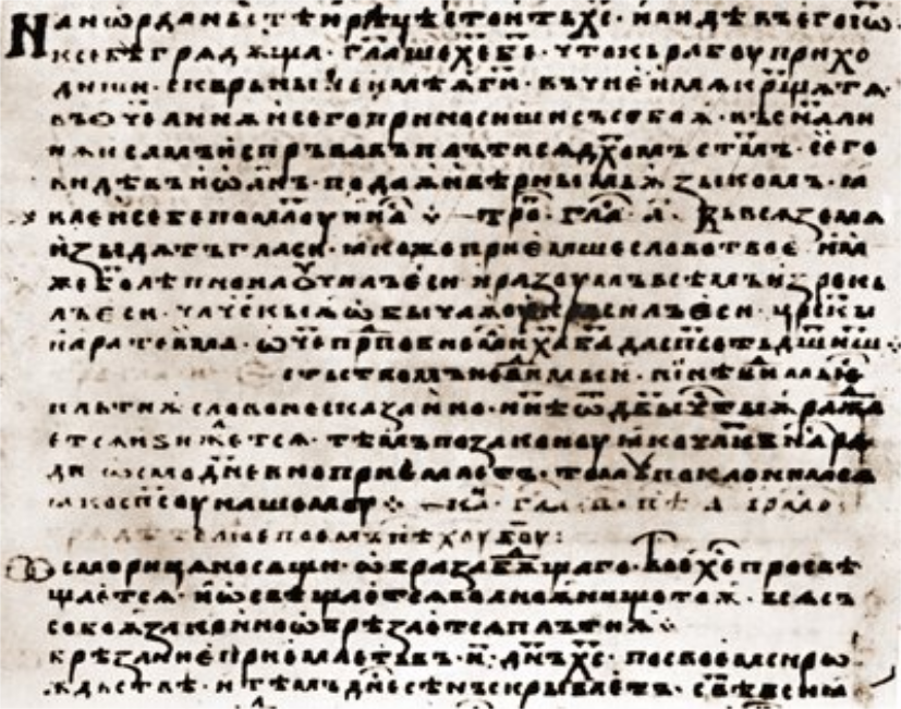 Драганов миней